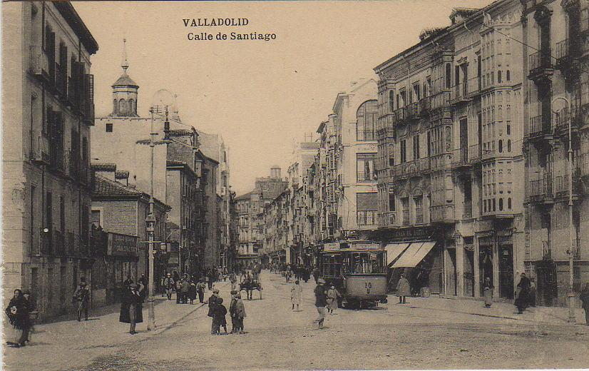 Tarjeta Postal. Valladolid. Calle de Santiago. Animada. Vista general de la avenida. Reverso = L. J. Valladolid. Fototipia de HAUSER MENET. Madrid).